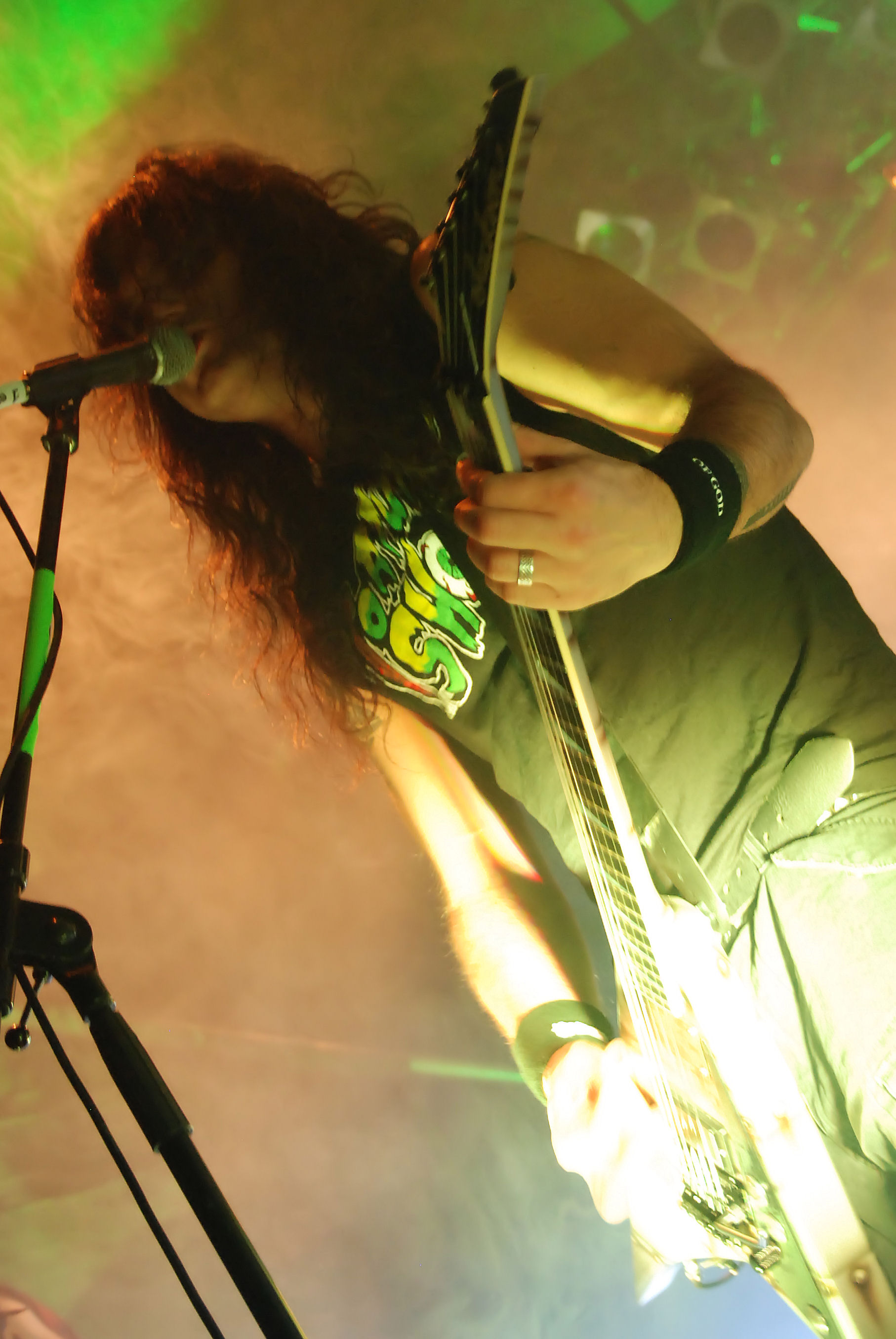 Kreator podczas koncertu w Klubie Studio w Krakowie